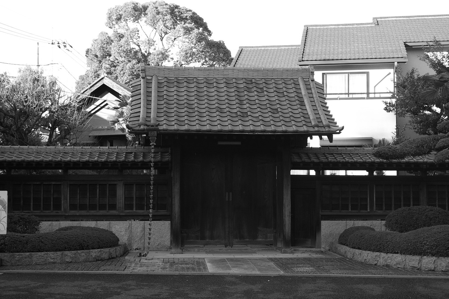 Gate to Jinya at Osugi-gotencho, Nakahara-ku, Kawasaki, Kanagawa, Japan